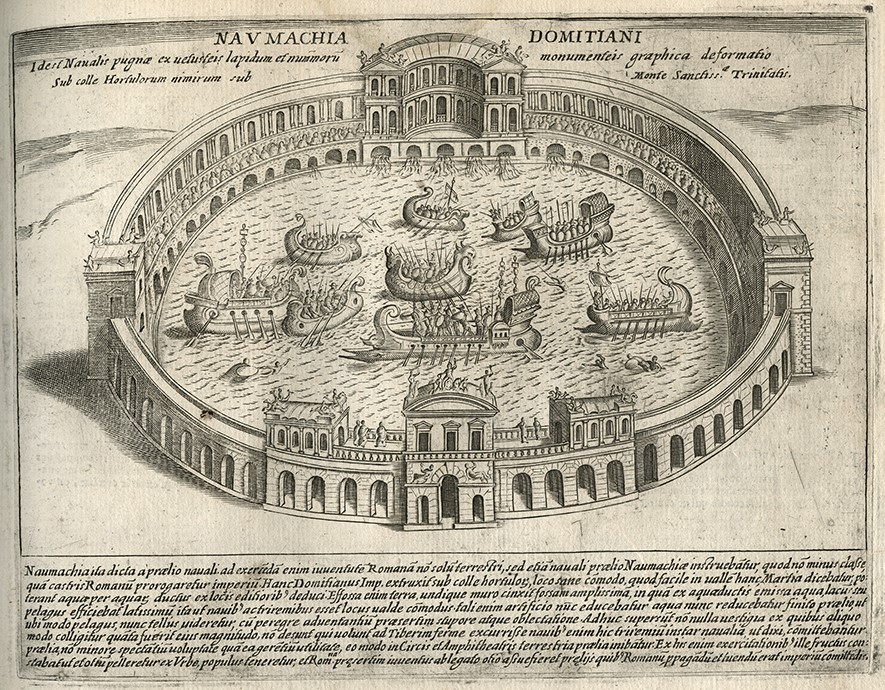 Naumachia Domitiani; aus: Alexander Adam: Handbuch der römischen Alterthümer. Zur vollständigen Kenntnis der Sitten und Gewohnheiten der Römer und zum leichtern Verständnis der lateinischen Klassiker, durch Erklärung der vornehmsten Worte und Redensarten, die aus den Sitten und Gebräuchen erläutert werden müssen. Aus dem Englischen nach der zweiten beträchtlich vermehrten Ausgabe übersetzt und mit Zusätzen und erläuternden Anmerkungen bereichert von Johann Leonhardt Meyer. Erlangen, Heyder, 1818.